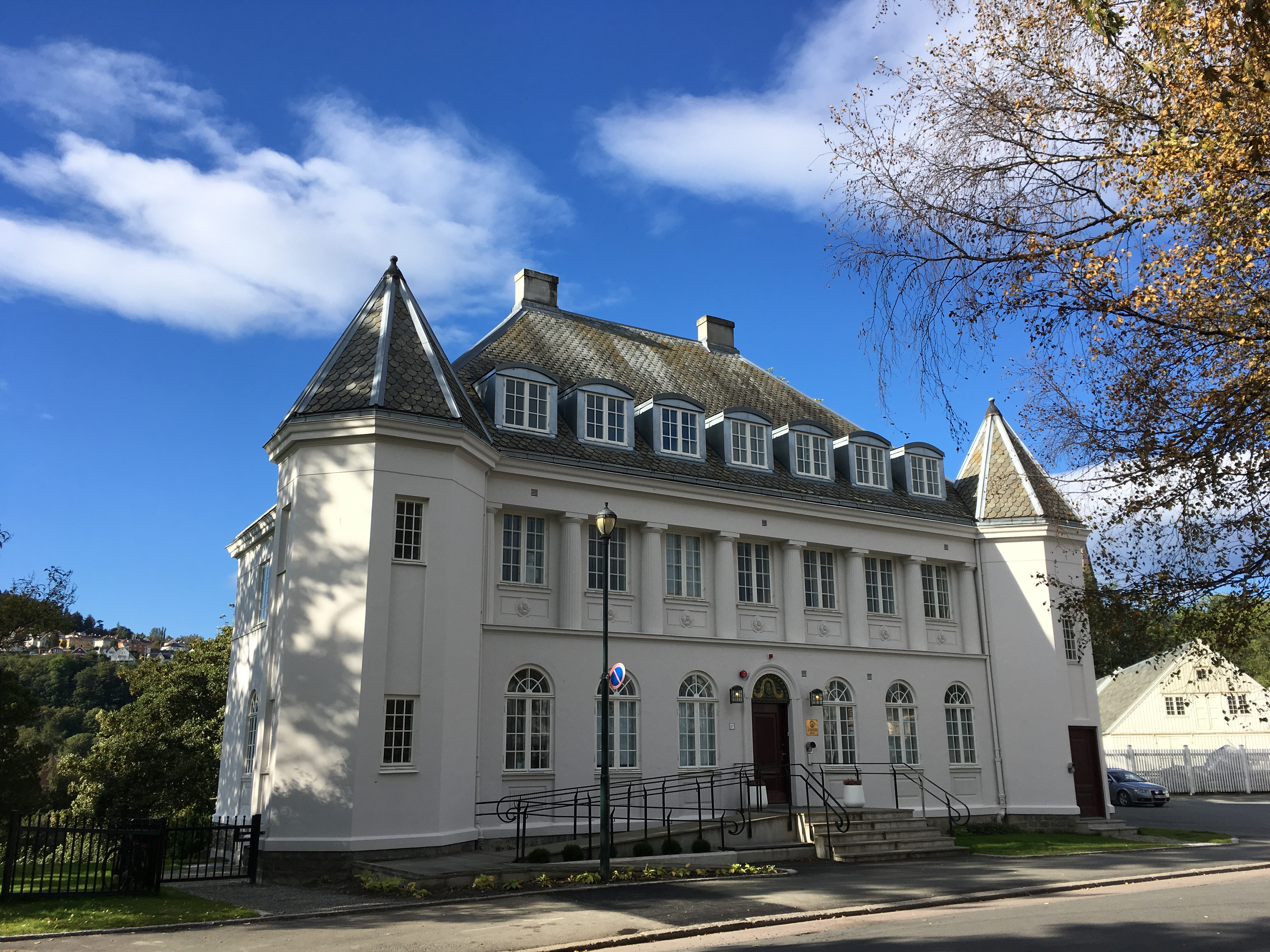 Fylkesmannsboligen, oppført som embetsbolig for stiftsamtmannen i Trondheim, 1914–1915. Arkitekt: Olaf Nordhagen